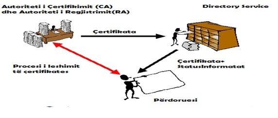 Autoriteti Certifikues